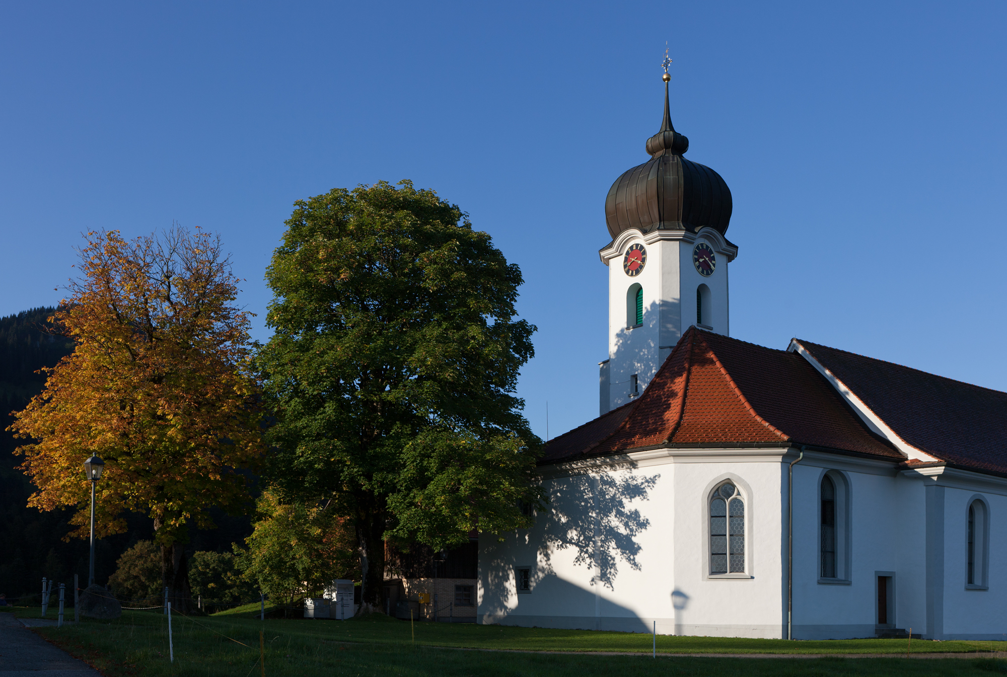 Wallfahrtskirche Heiligkreuz ob Hasle im Entlebuch